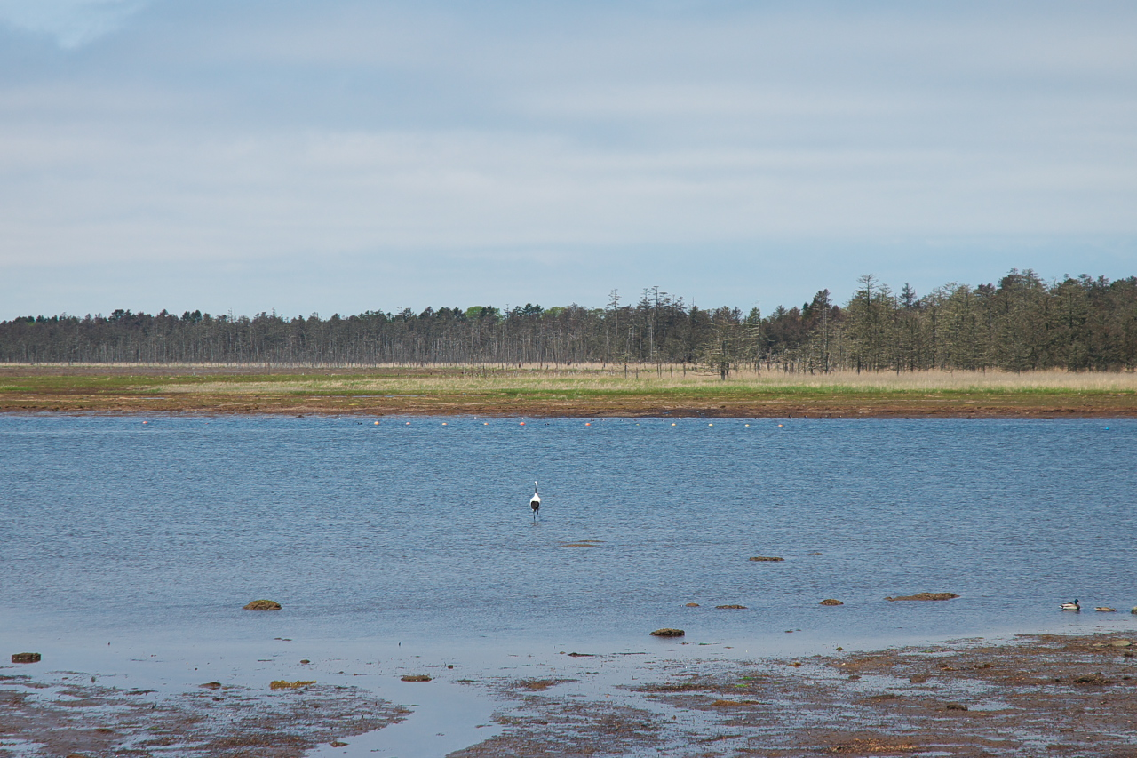 風連湖岸を走っているときに丹頂鶴を見かけました。